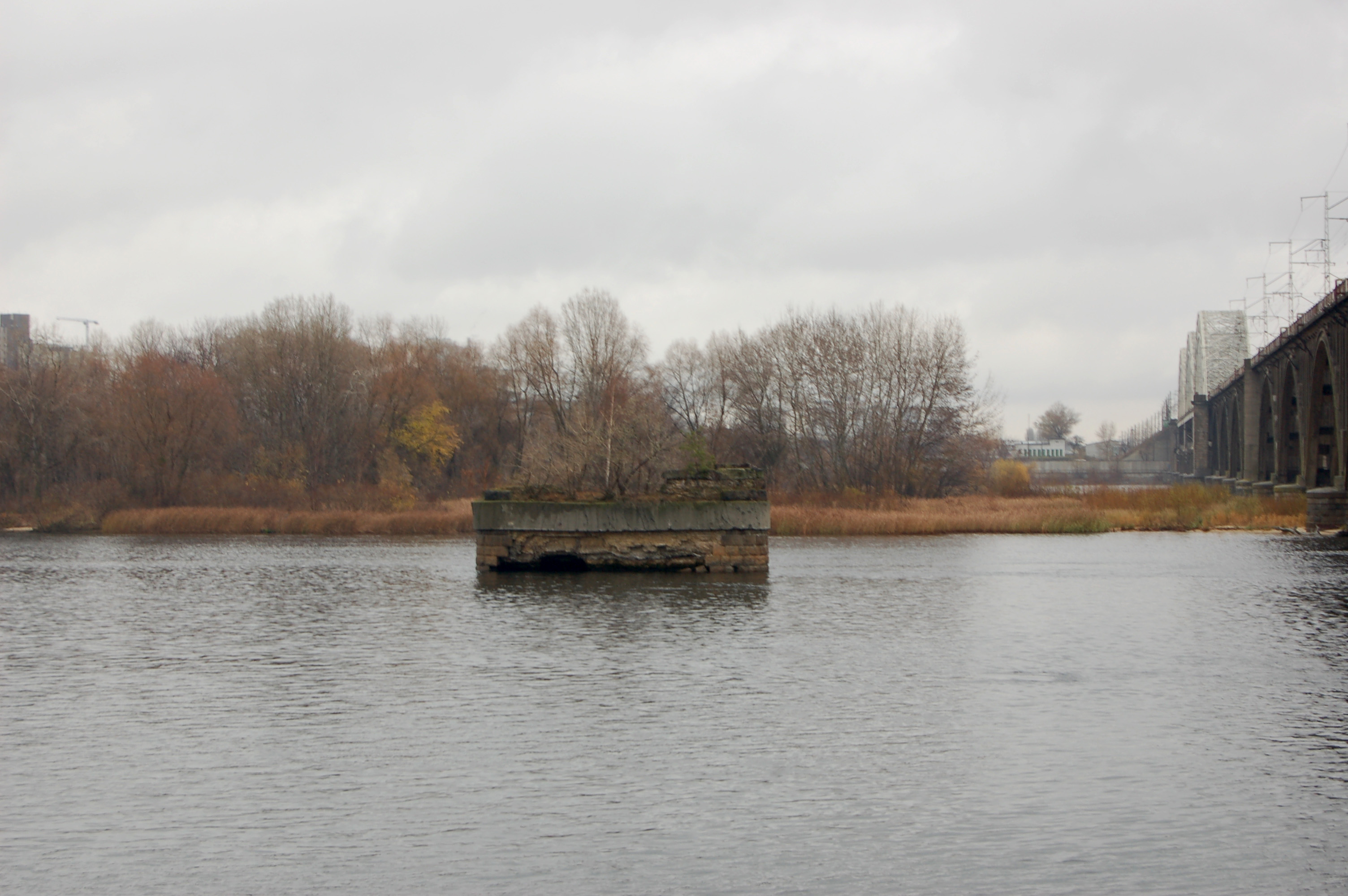 Остатки одной из опор железнодорожного моста Струве рядом с Дарницким железнодорожным моста в Киеве